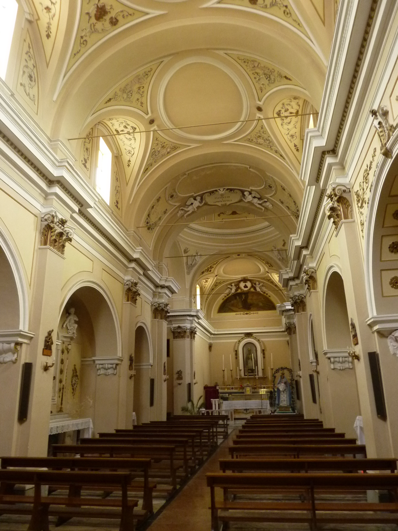 Bolognano: Interno della Chiesa di Sant'Antono